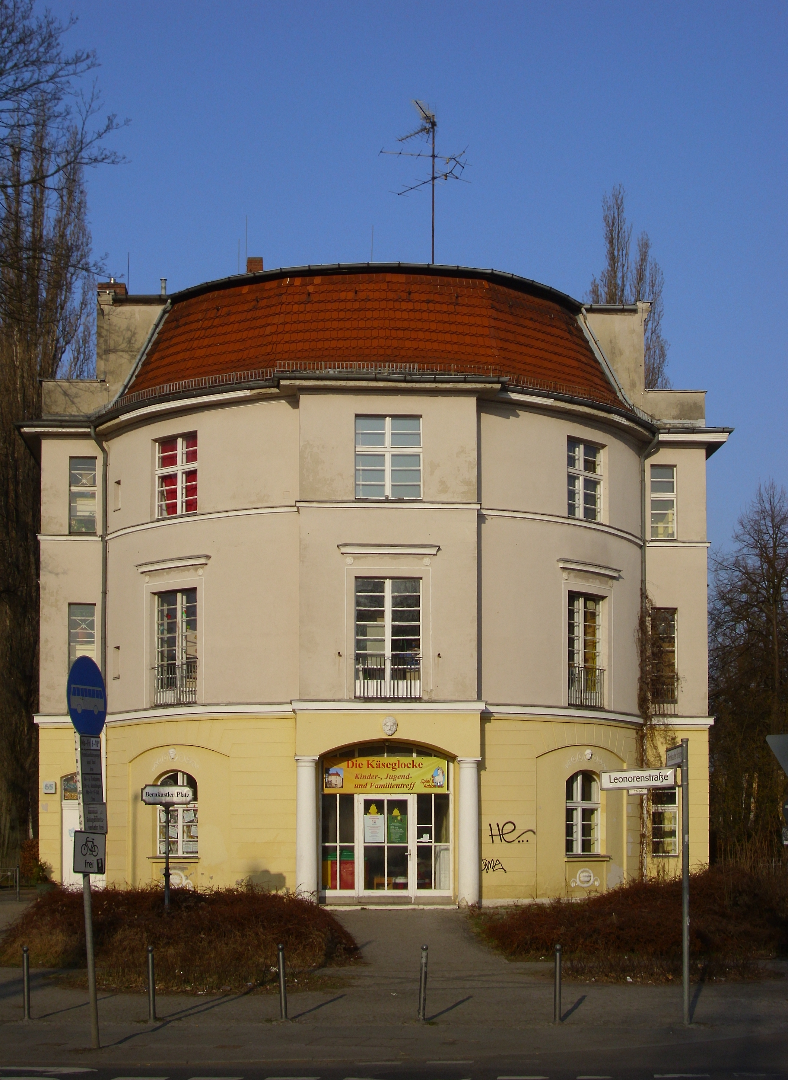 Baudenkmal Parkwohnhaus Käseglocke, Leonorenstraße 65, 12247 Berlin